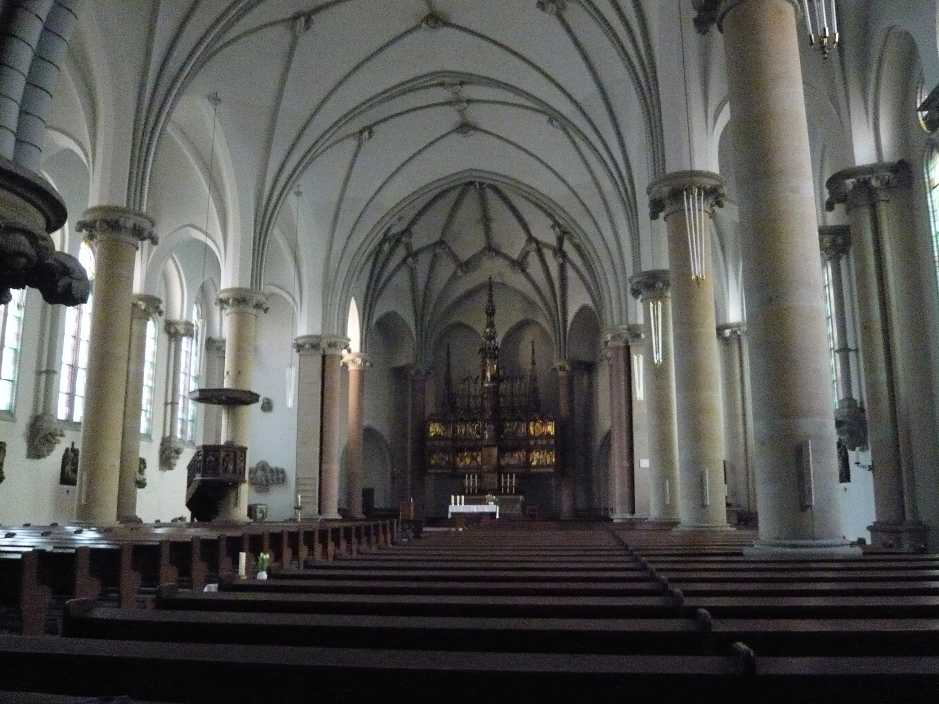 Kath. Kirche S. Corpus Christi, Prenzlauer Berg, Conrad-Blenkle-Straße